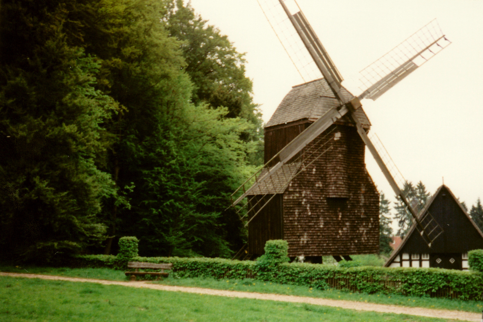 Bielefeld, Bauernhausmuseum im Mai 1995. Bockwindmühle und "Meierhof zu Ummeln" (17.Jahrhundert, kurze Zeit nach der Aufnahme durch Brand vollständig vernichtet).